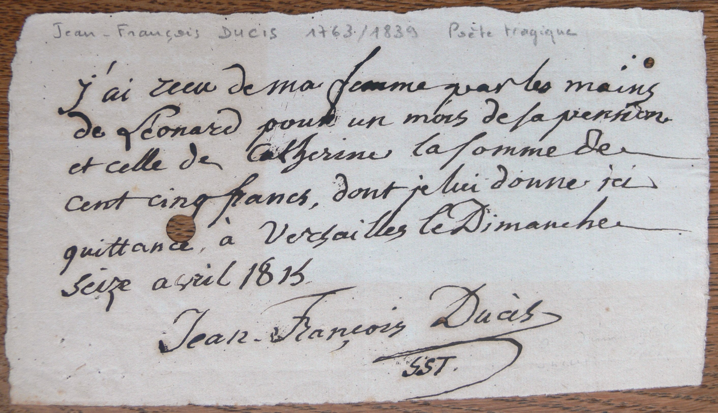 Reçu autographe de Jean-François Ducis (1815) : "J'ai reçu de ma femme par les mains de Léonard pour un mois de sa pension et celle de Catherine la somme de cent cinq francs, dont je lui donne ici quittance. À Versailles, le dimanche seize avril 1815. Jean-François Ducis"